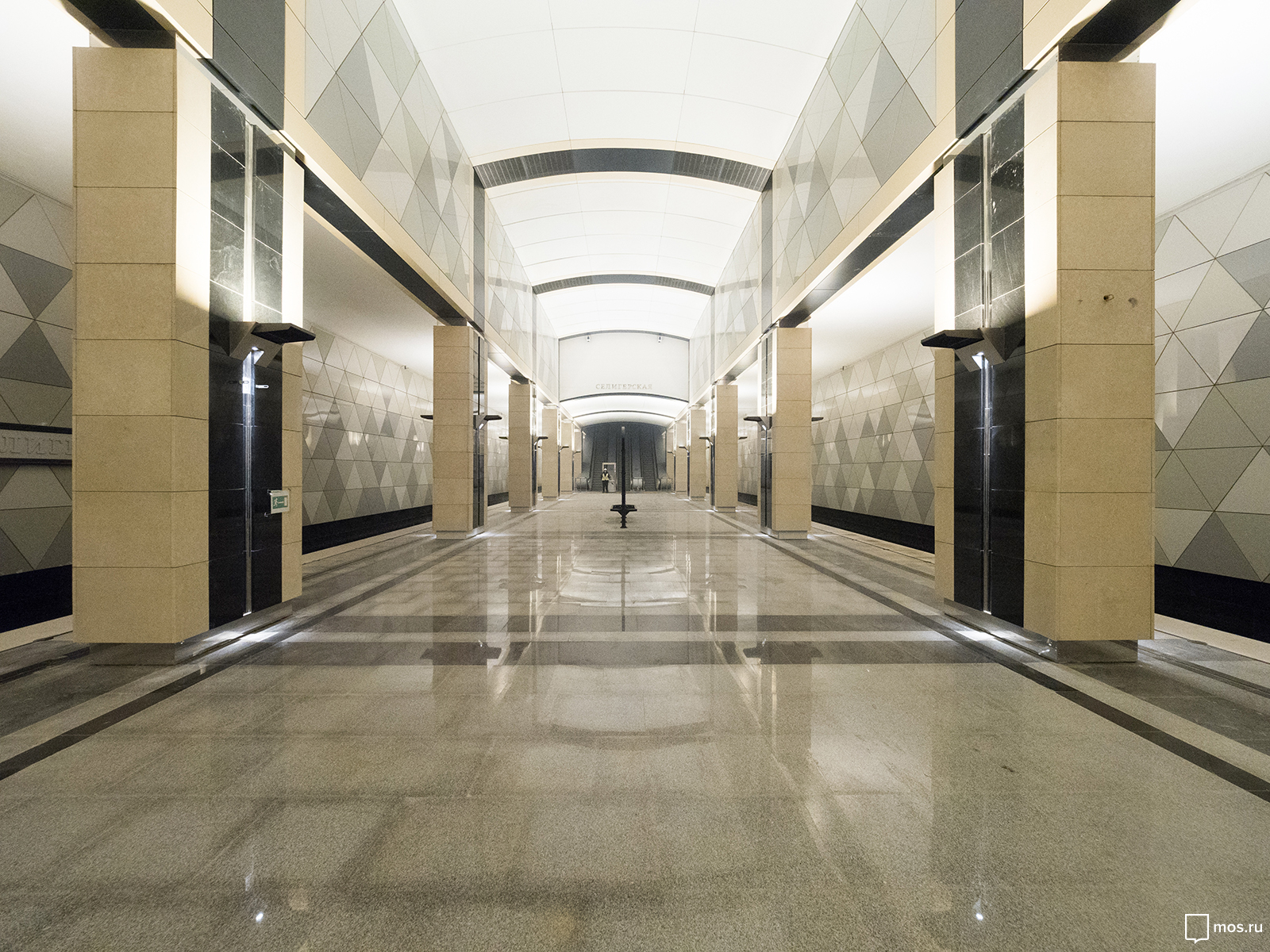 Центральный зал